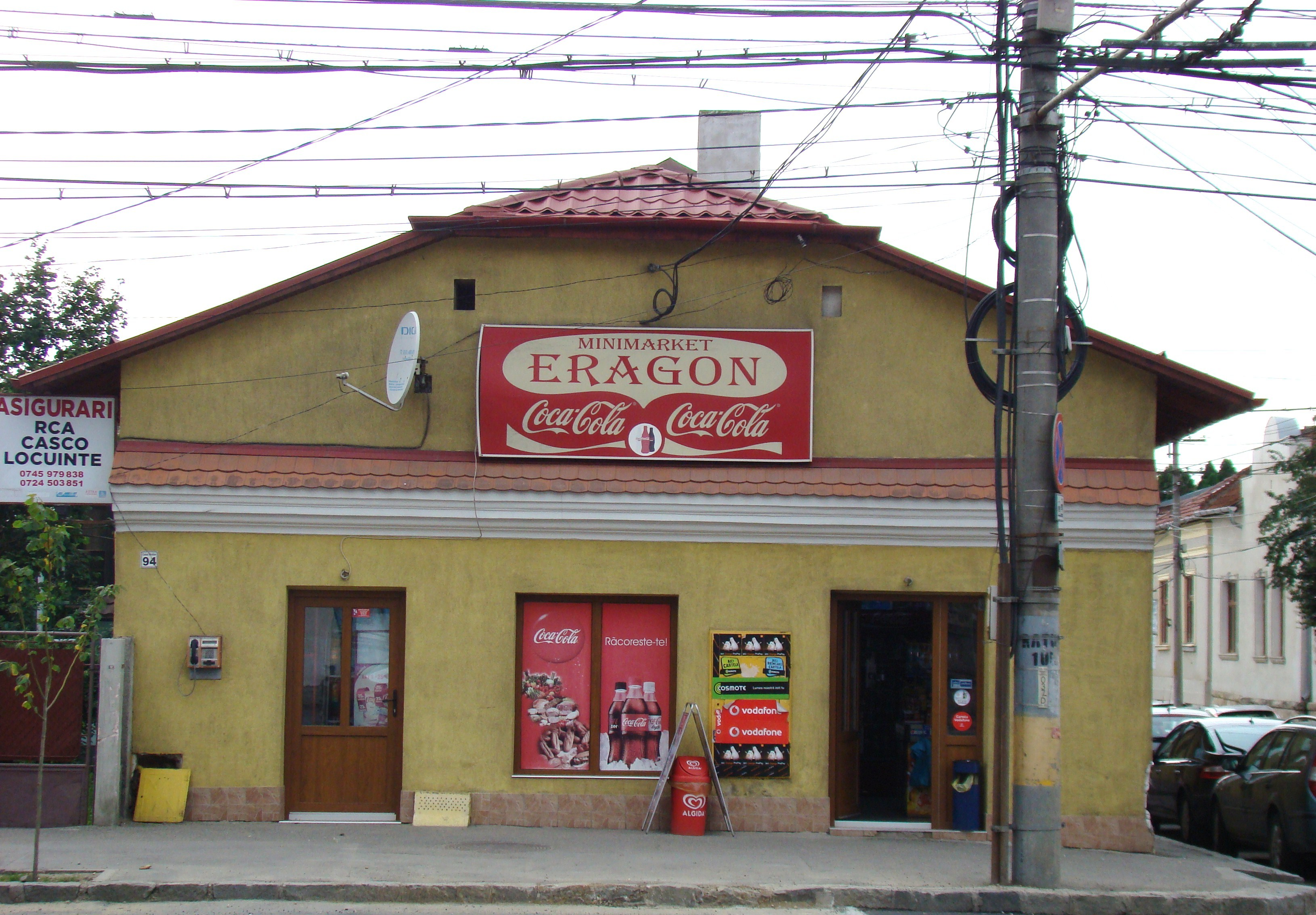 Clădire monument istoric, Calea Moților, nr. 94